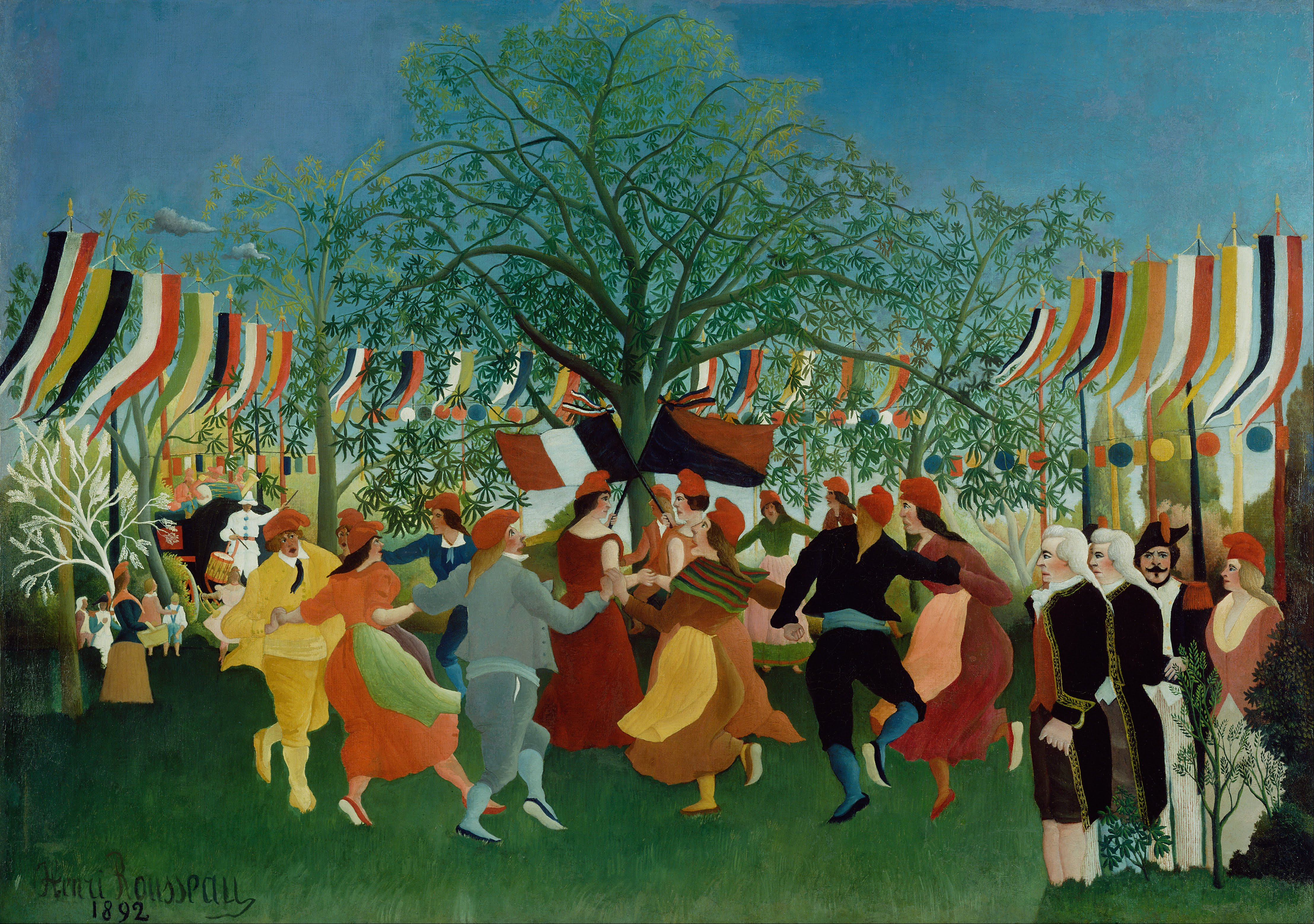 Avec ce tableau, Henri Rousseau commémore le centenaire de la Première République française de 1792]